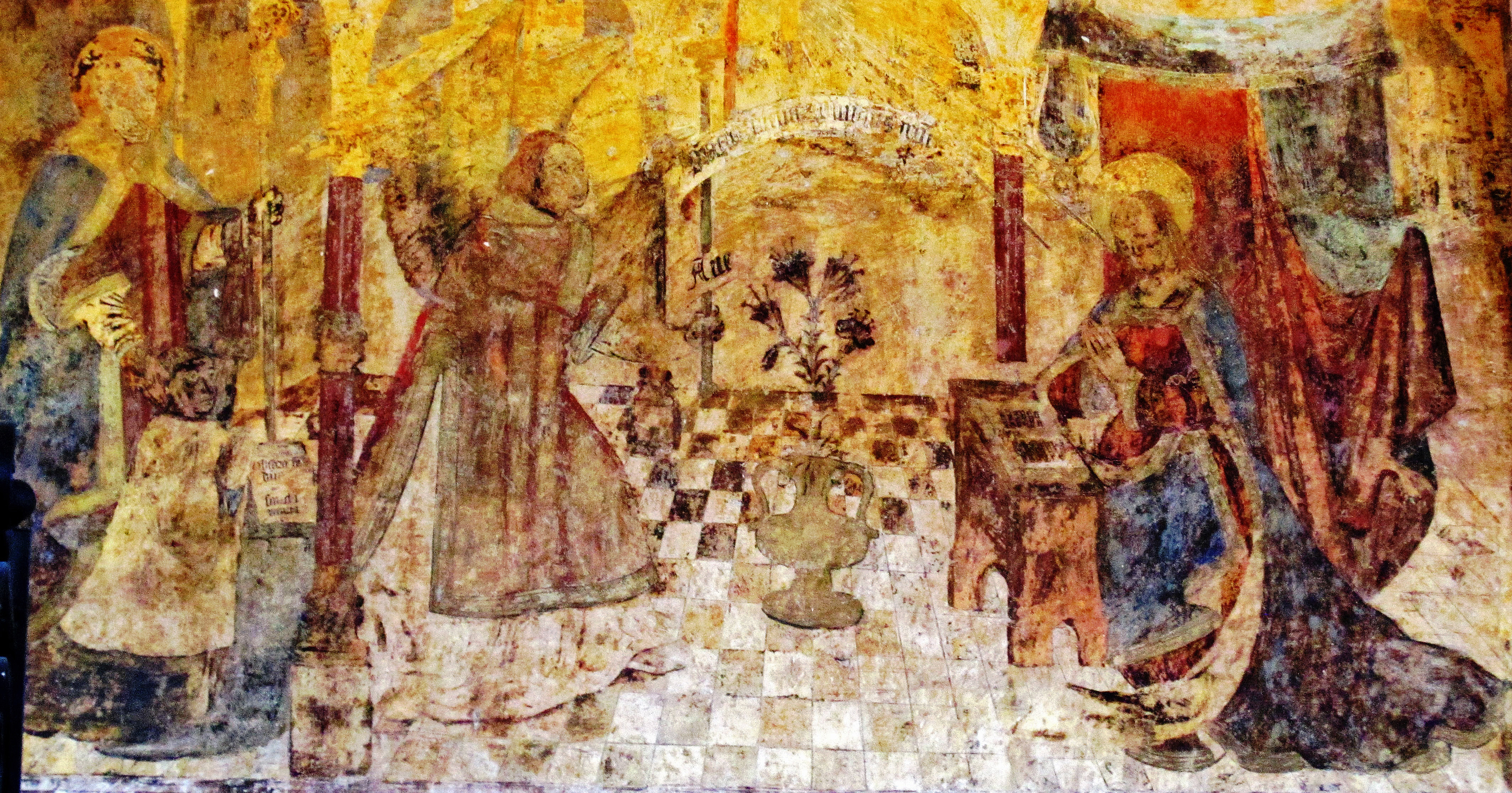 Fresque de la chapelle Saint-Phal (Côte-d'Or)